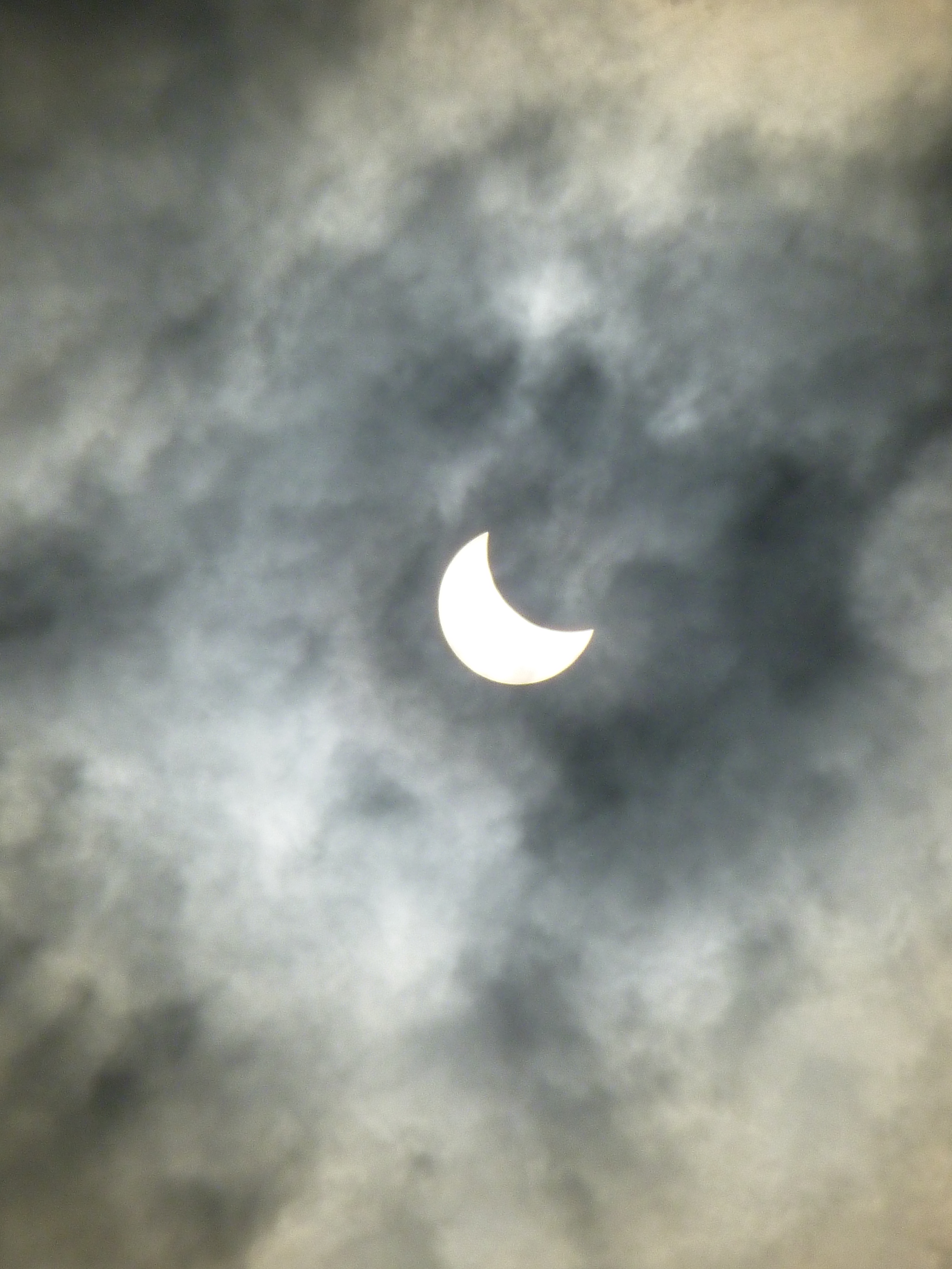 Eclissi solare del 20 marzo 2015, Venezia (Italia) Ore 10:12